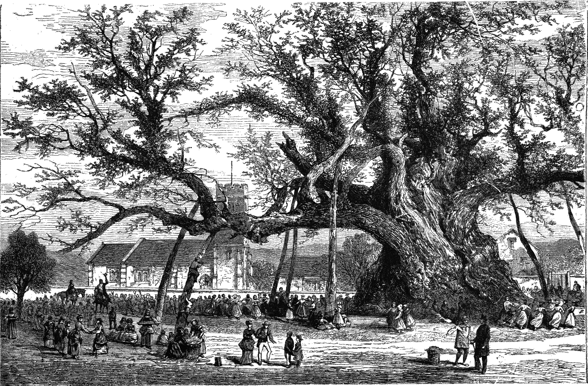 La Nature - 1873 - Durée de vie des arbres- Le vieux chêne de Cowthorpe - p041